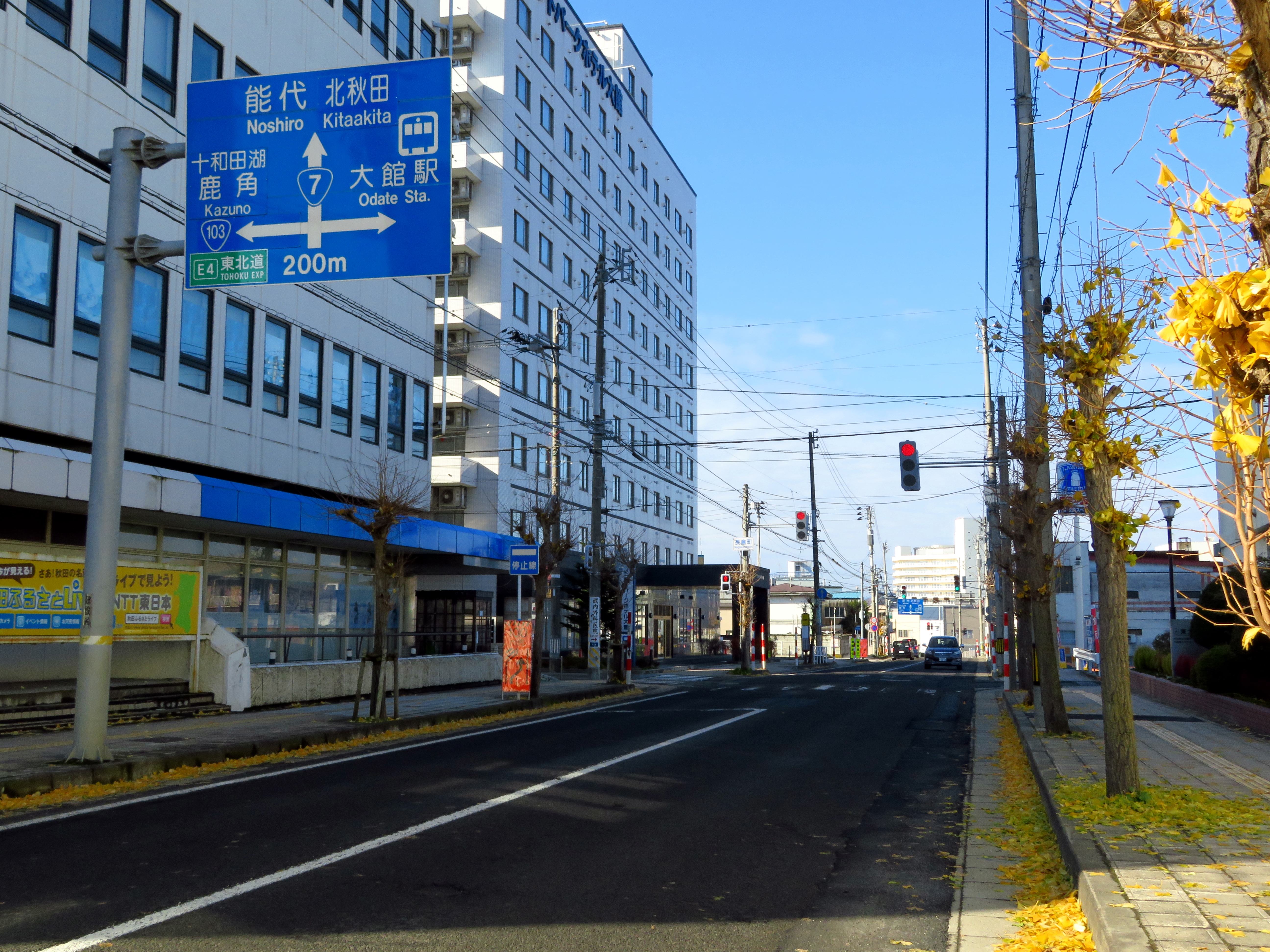 国道7号 秋田県大館市長倉付近 Canon PowerShot SX720 HS